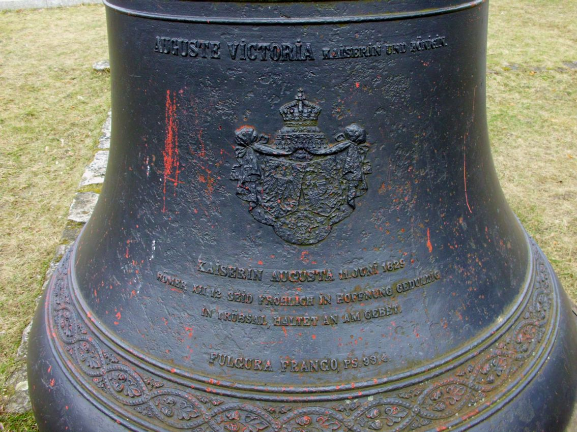 Kaiserin-Auguste-Victoria-Glocke der Gnadenkirche Berlin (Mitte), Detail